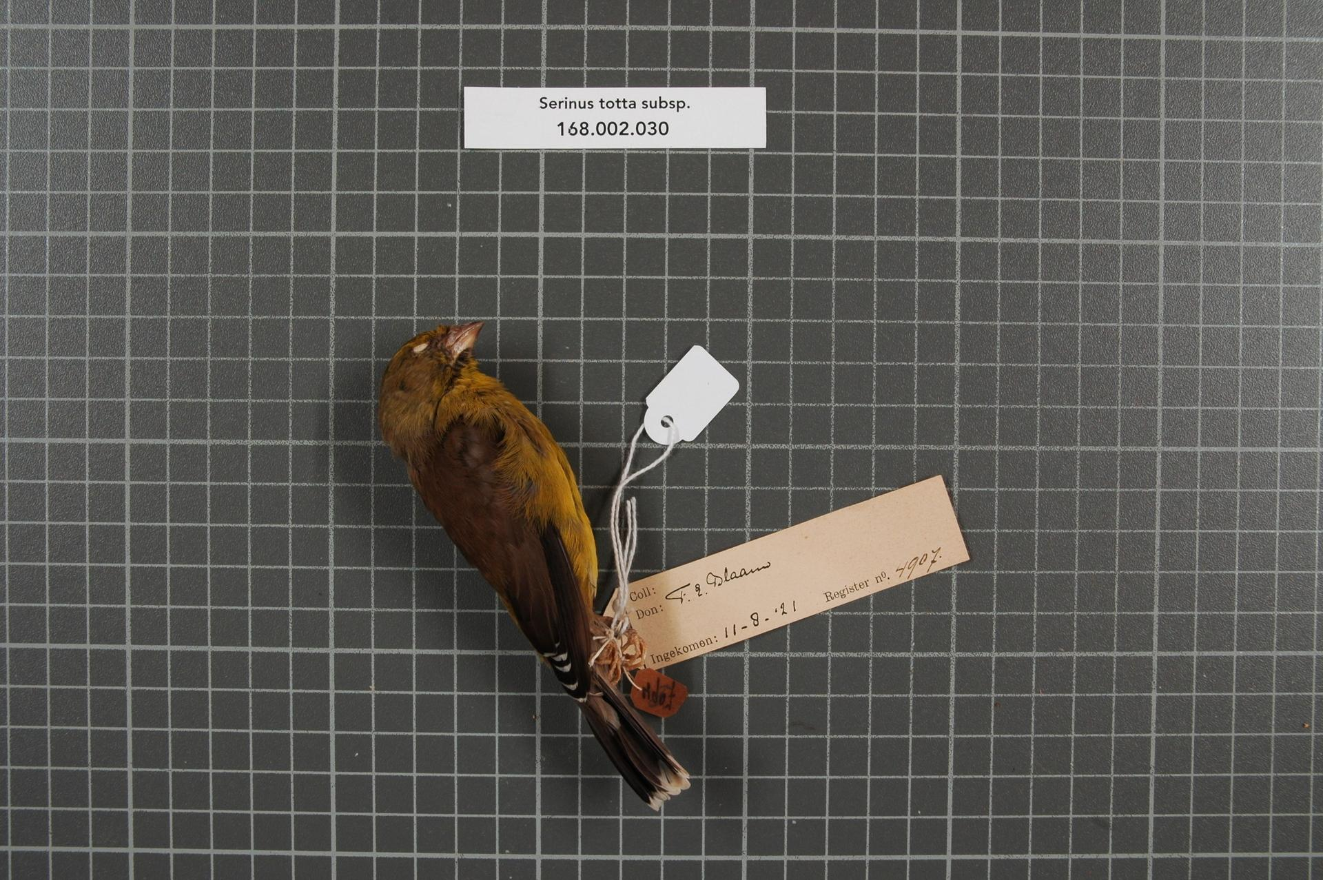 Serinus totta subsp.